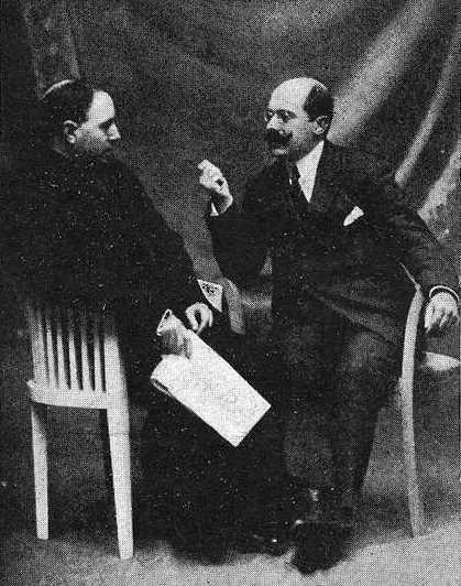 José Toubes e Jacobo Varela de Limia, fotografía 1920